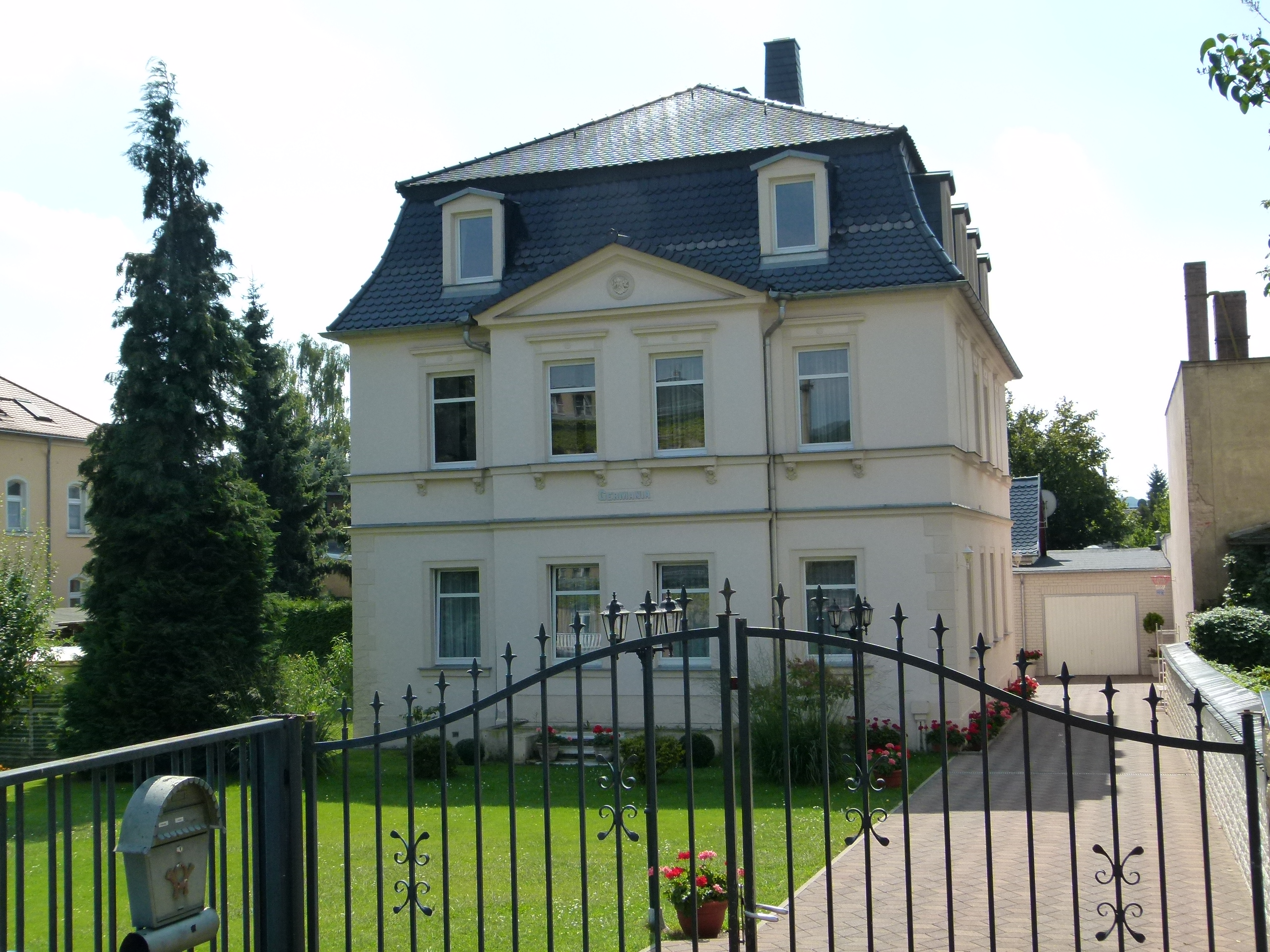 Denkmalgeschütztes Haus, Meißner Straße 221, Radebeul, Sachsen